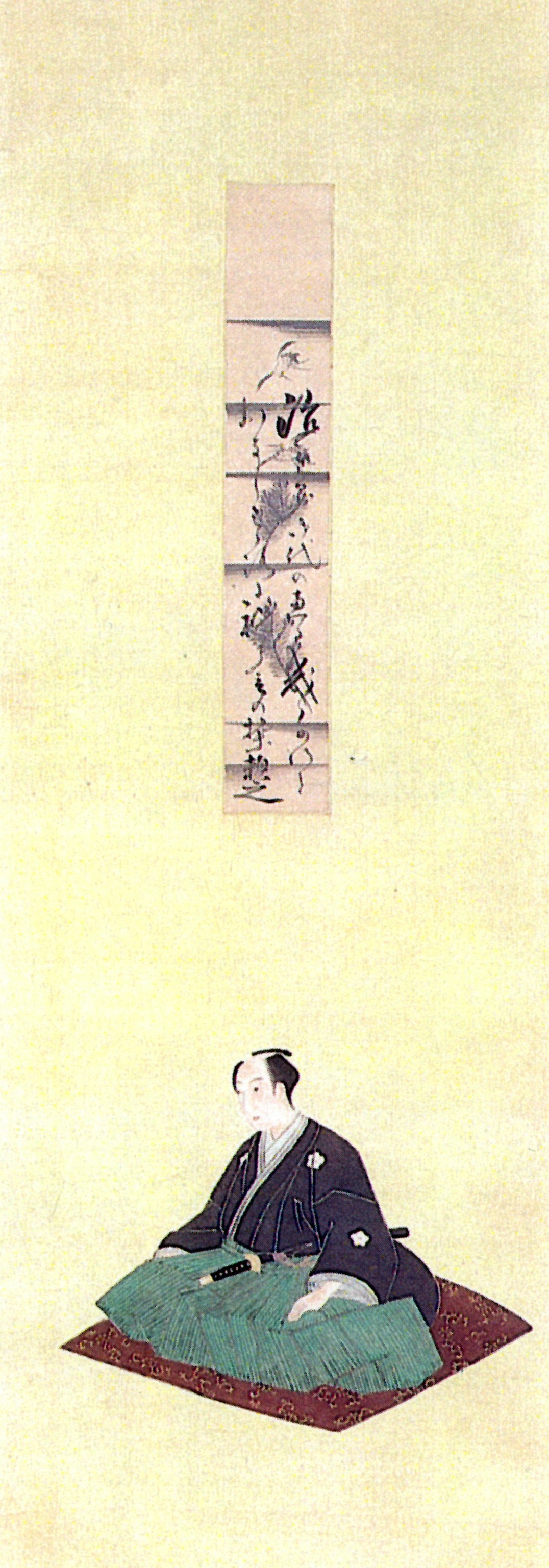 土岐頼之の肖像。